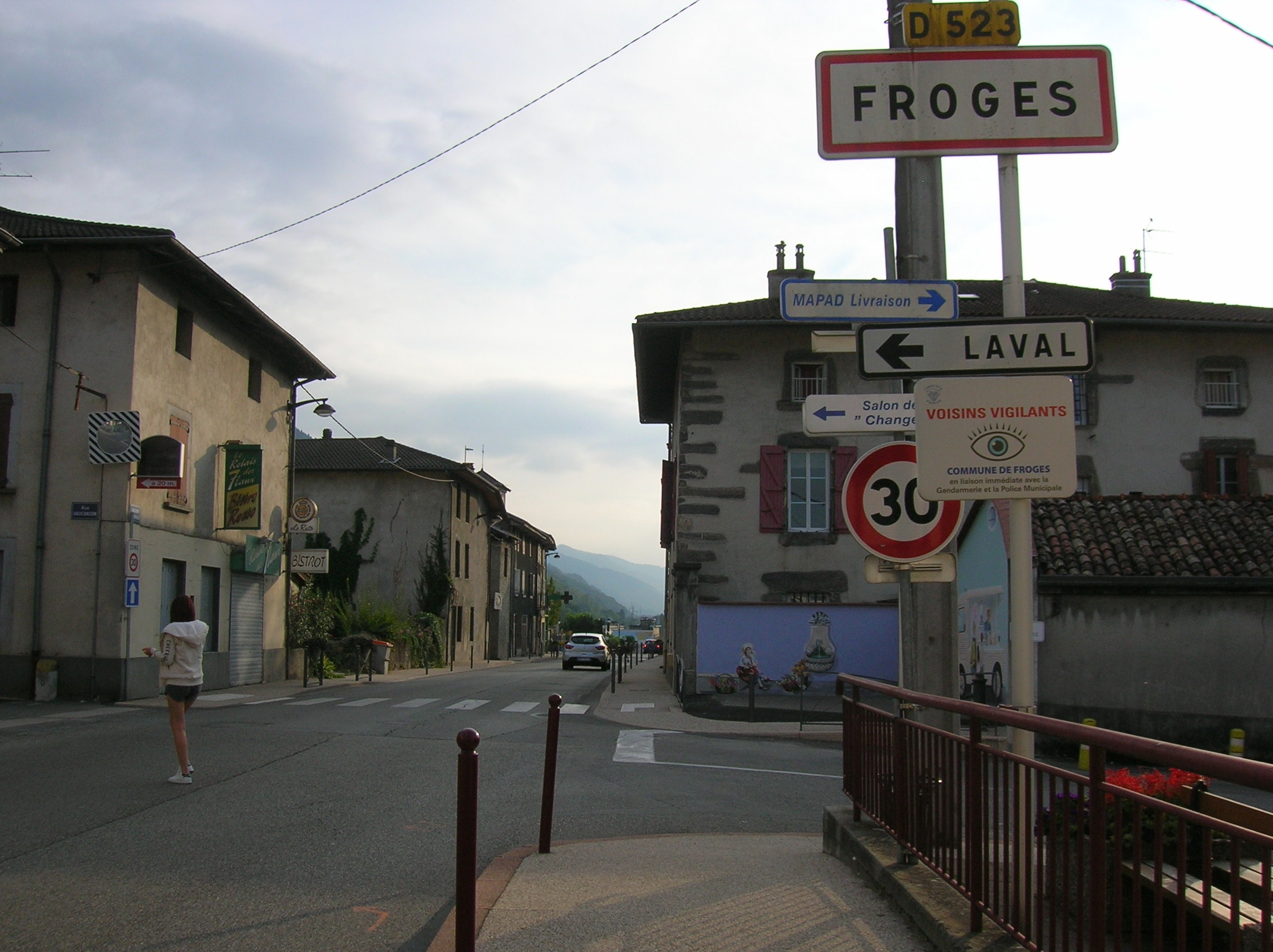 panneau à l'entrée de Froges, Isère, AuRA, France.